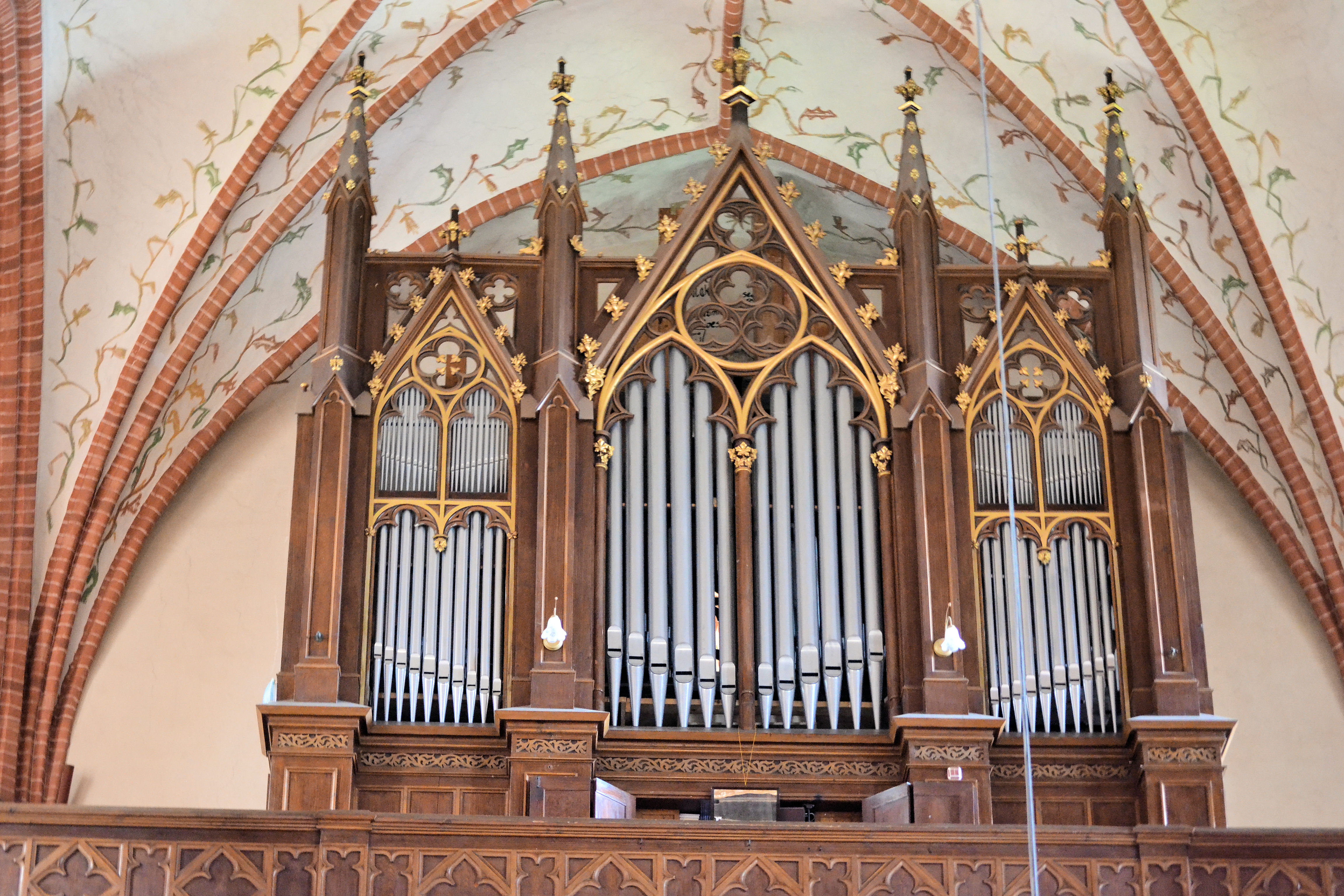 kościół Macierzyństwa NMP Trzebiatów